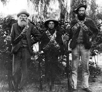 Commando boer composé de P.J. Lemmer (66 ans), D.L. Botha (15 ans), C.I. Pretorius (43 ans) armés de fusils Mauser